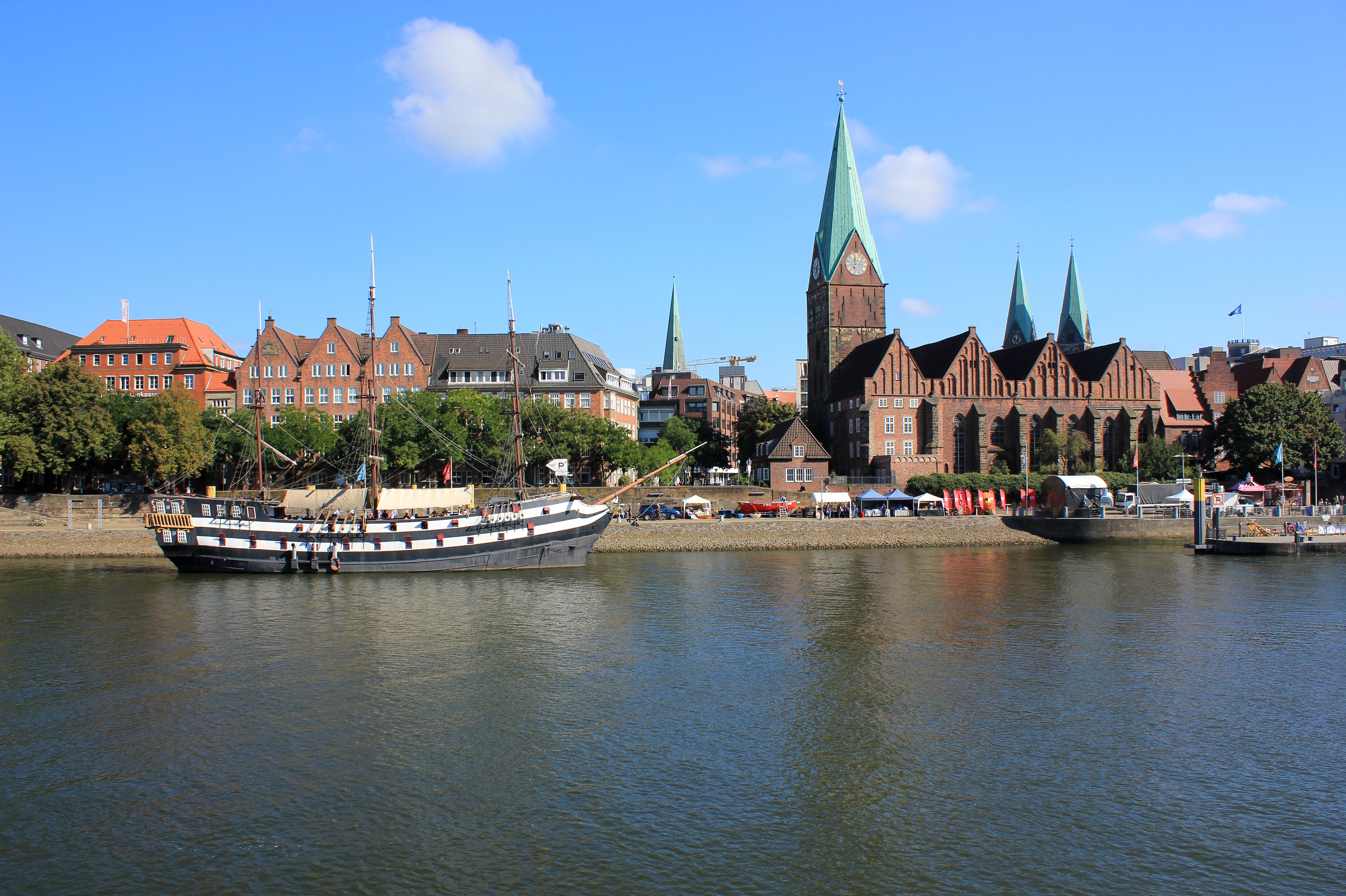 St. Martini, Neanderhaus in Bremen, Martinikirchhof 3Das abgebildete Objekt ist ein geschütztes Kulturdenkmal in der Freien Hansestadt Bremen, mit der Nr. 0875,T beim Landesamt für Denkmalpflege registriert.